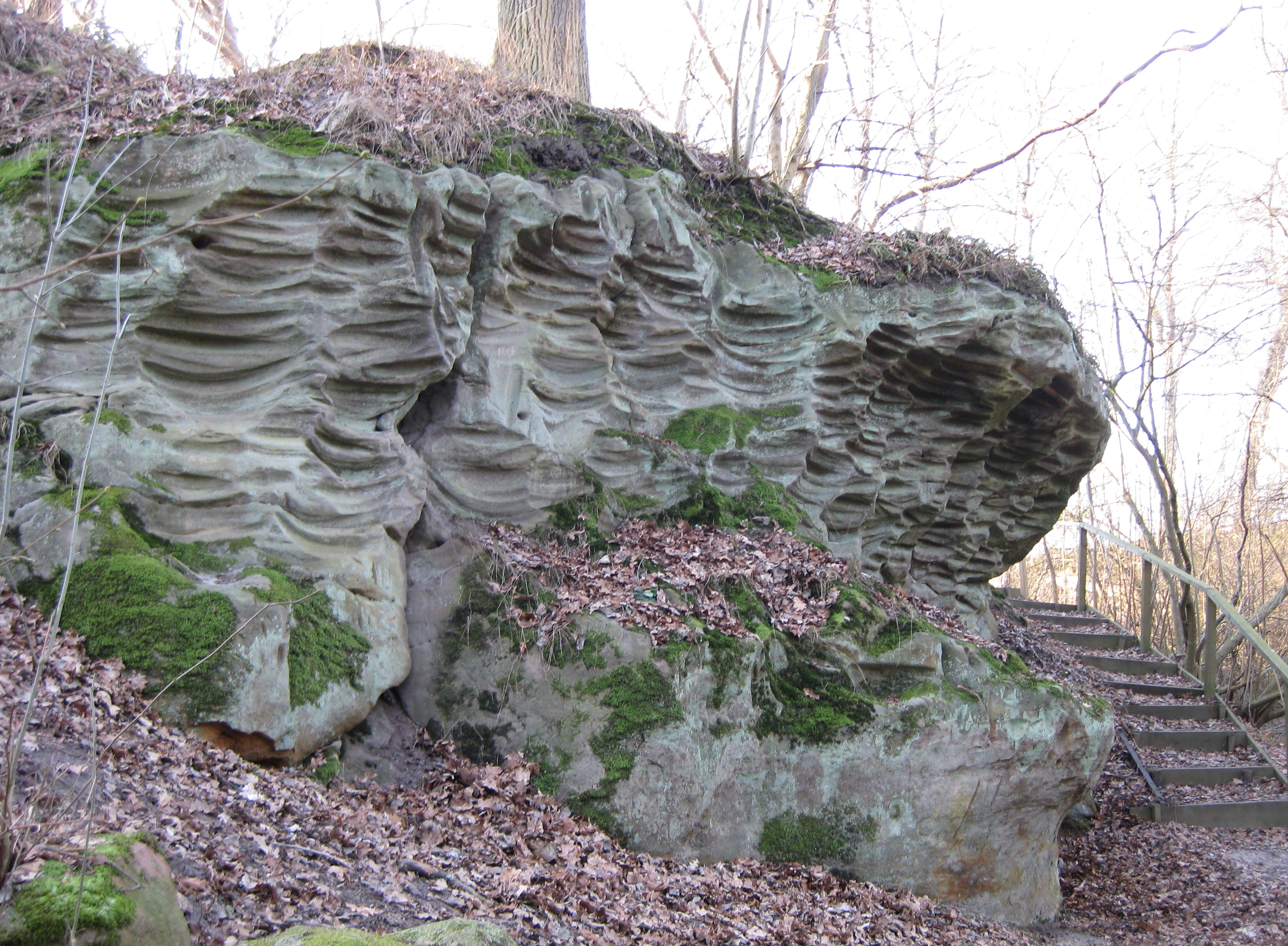 Sliprännor vid Gantofta, Kvistofta socken, Luggude härad, Helsingborgs kommun, Skåne län, Skåne, Sverige.